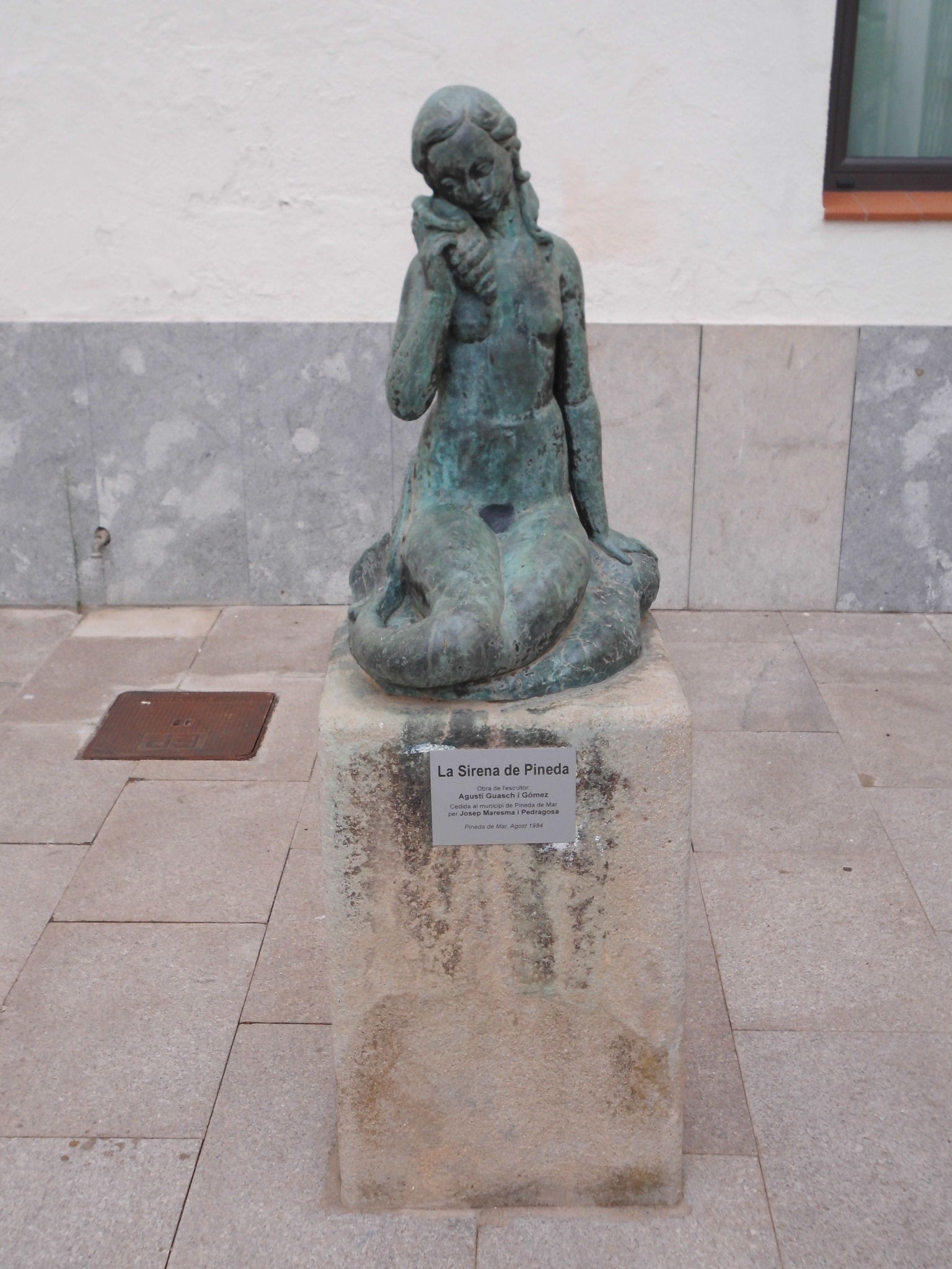 La Sirena de Pineda de l'escultor Agustí Guasch i Gómez